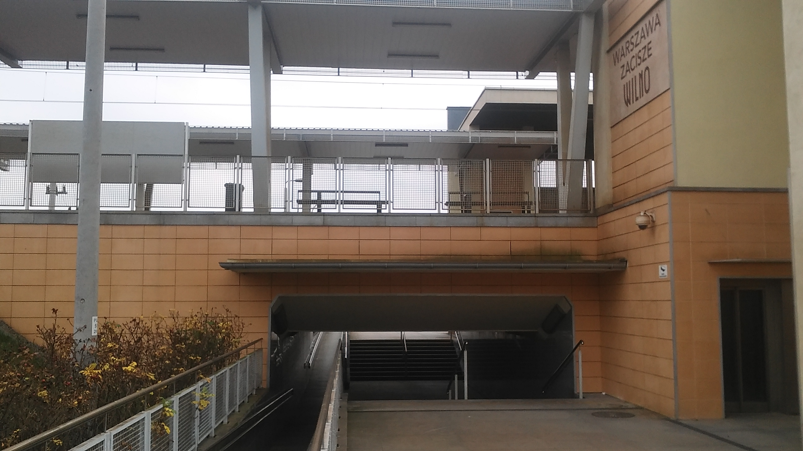 przystanek kolejowy Warszawa Zacisze-Wilno - przejście pod torami między peronami